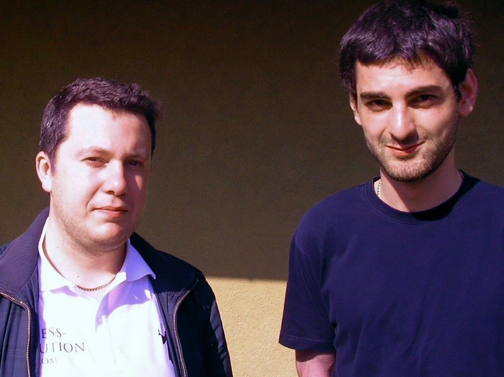 Arkadij Naiditsch und David Baramidze, 15. Internationales Neckar-Open (April 2011 in Deizisau).